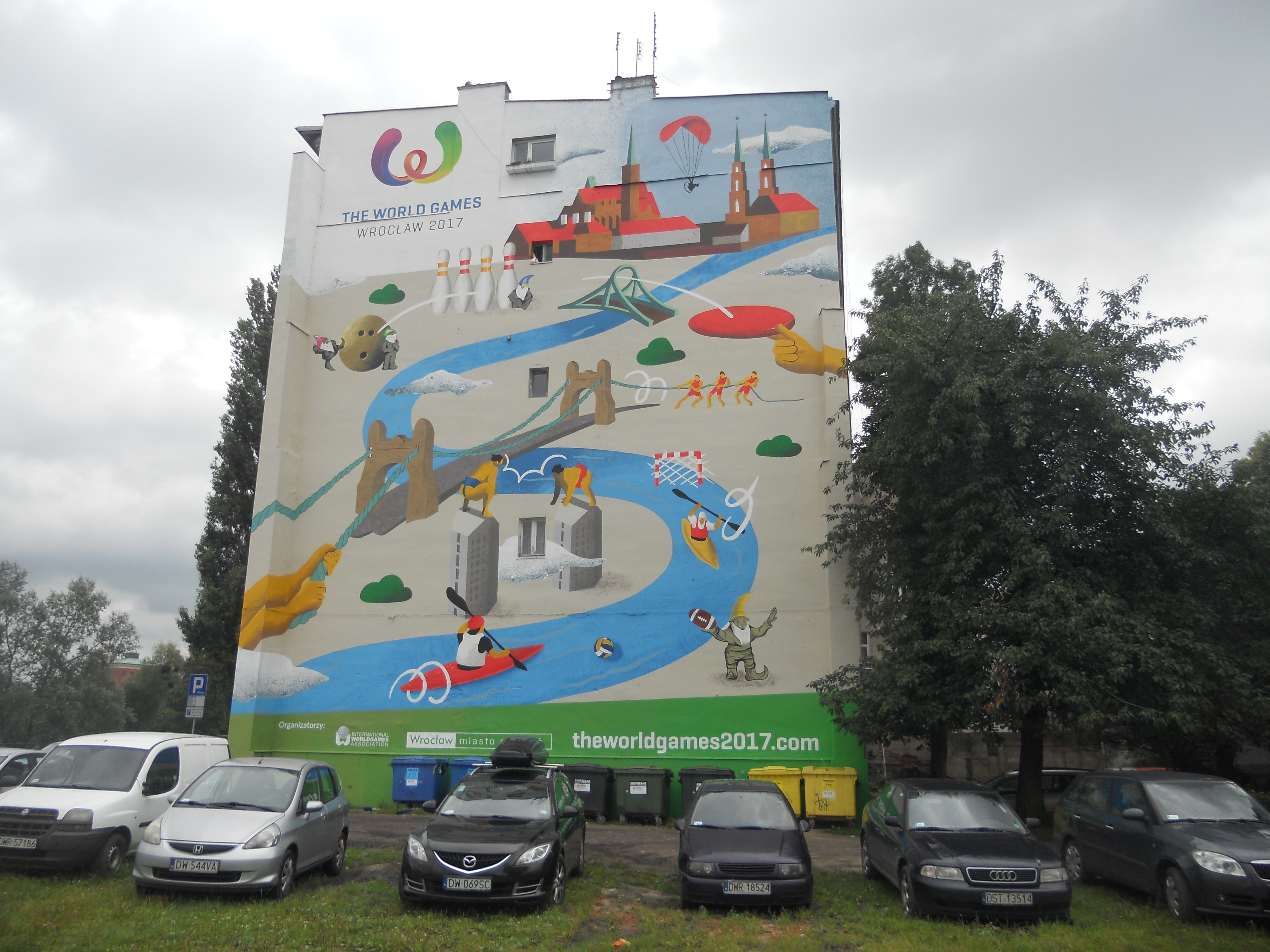 Роспіс сцяны будынка на Сусветных гульнях 2017